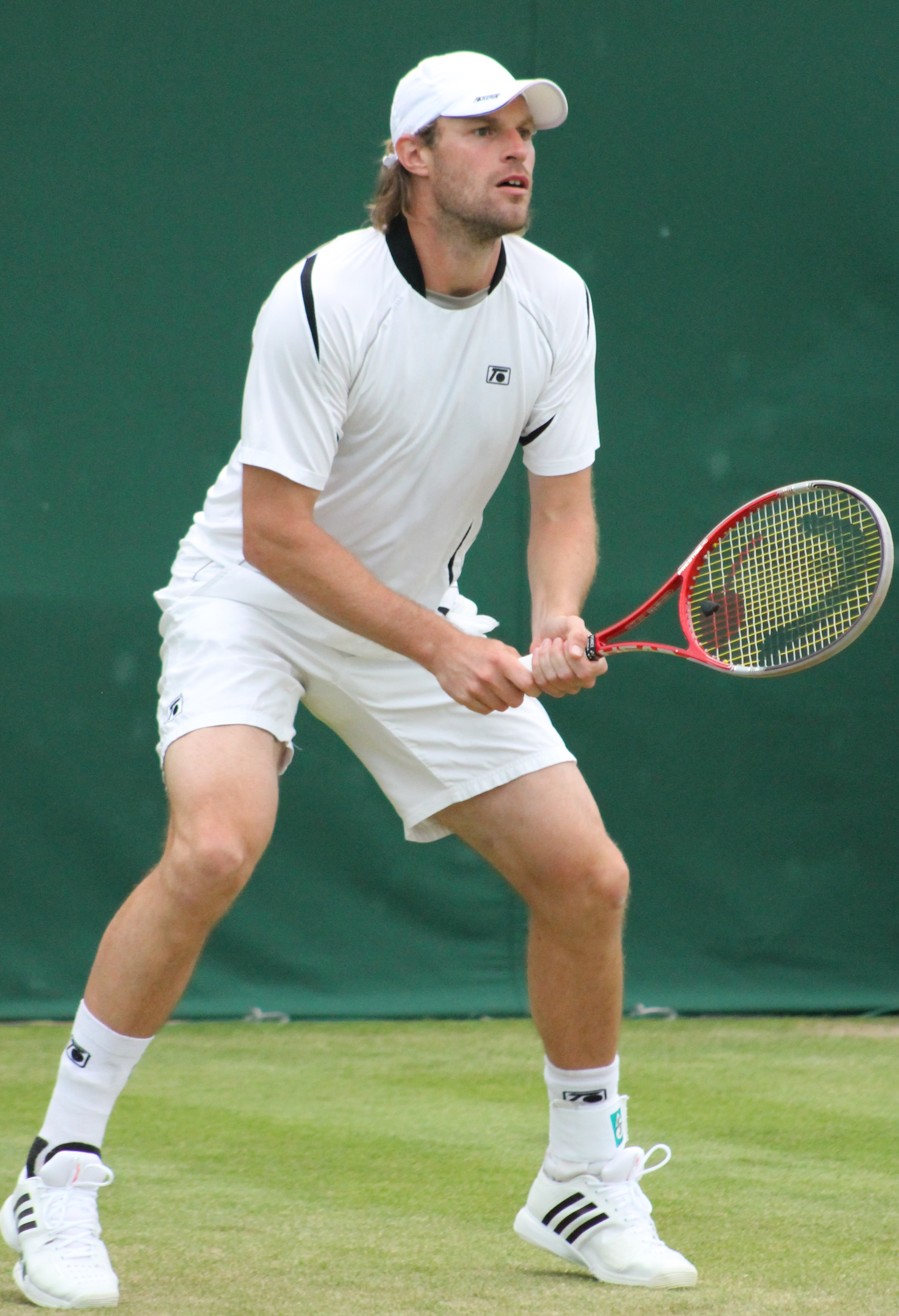 Moser WM13-001